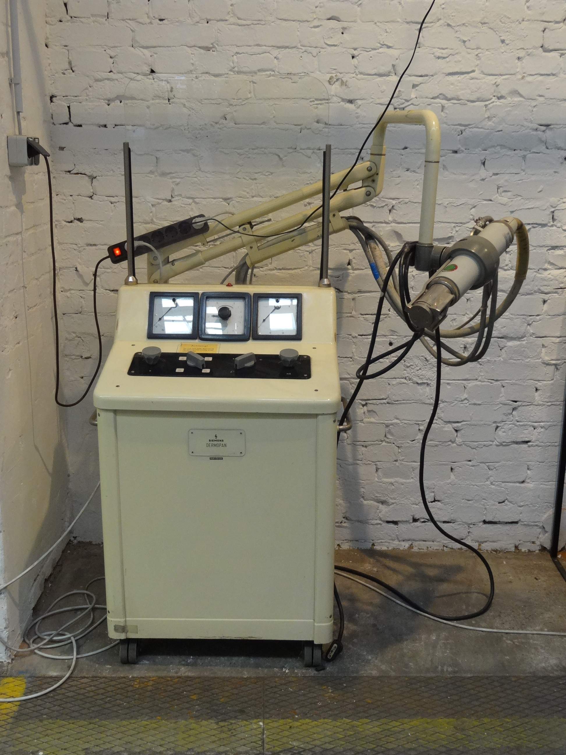 Technik-Museum Kassel